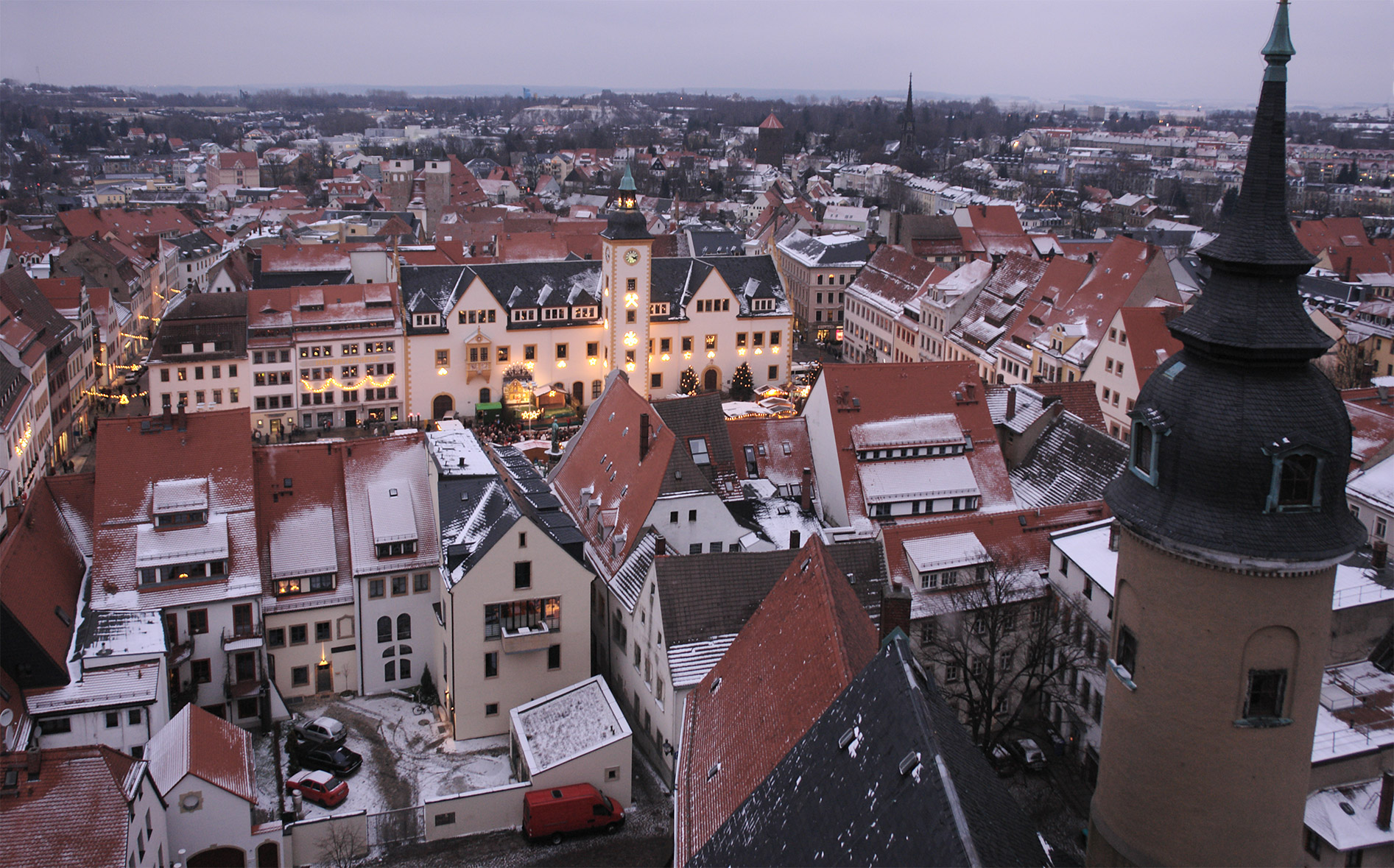 Blick vom Petriturm der Petrikirche auf den Obermarkt Freiberg